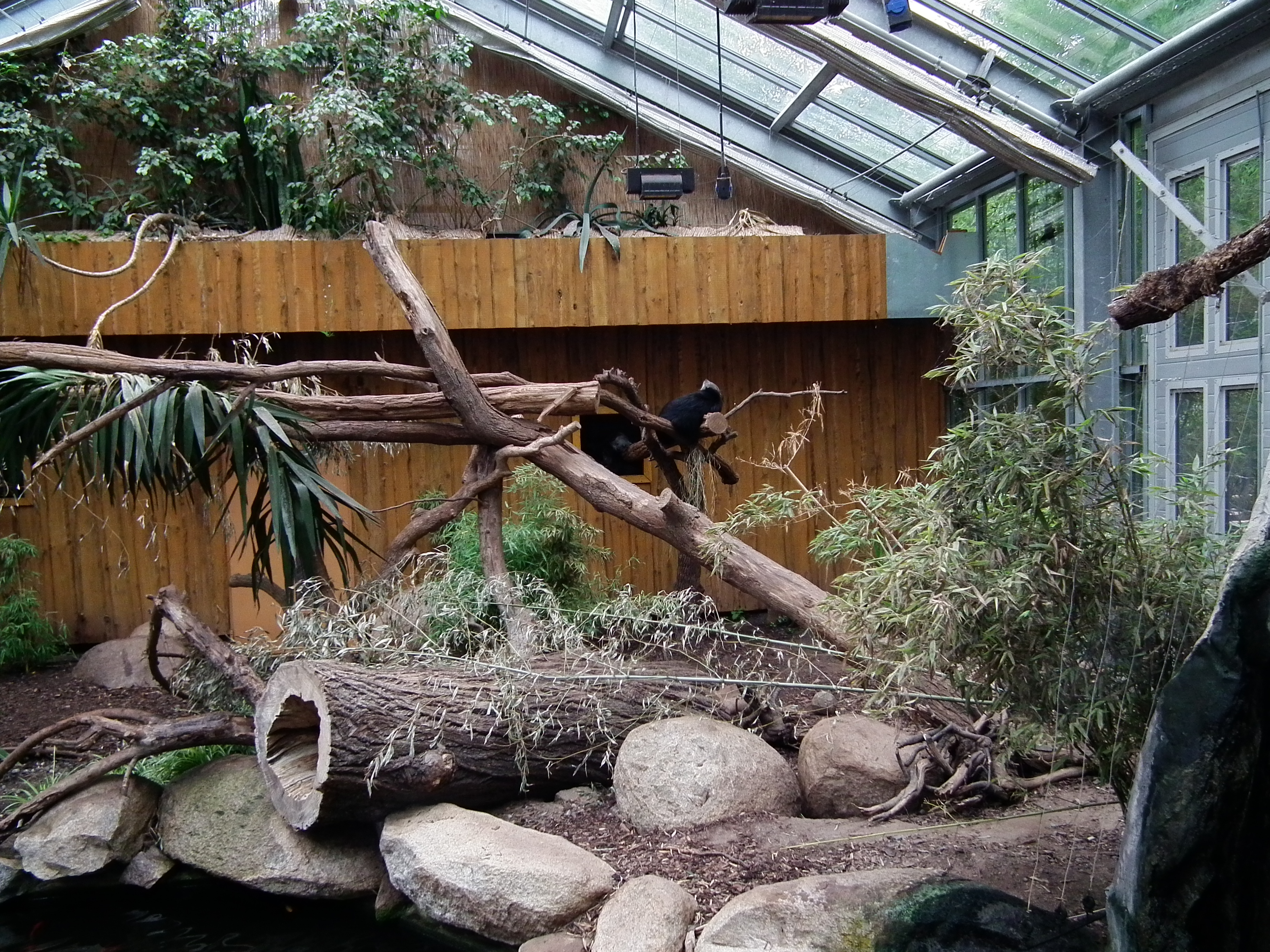 Gehege der Binturong (Arctictis binturong) im Vivarium Darmstadt (Hessen, Deutschland)